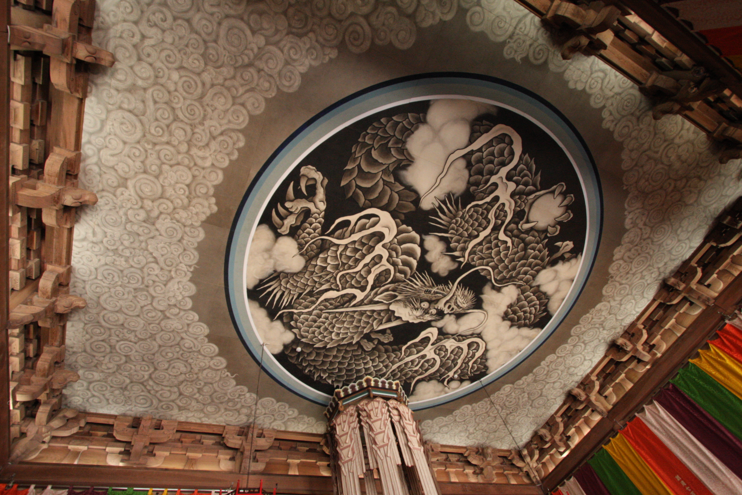 Basa Jawa: 鎌倉在住の日本画家、小泉淳作画伯の筆による「雲龍図」